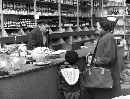 Spaarnestad Photo/SFA008000373 Repatrianten/spijtoptanten. Moeder met twee kinderen doet boodschappen/inkopen bij de toko in Amsterdam Slotermeer. Op de toonbank staat een schaal met kroepoek, op de achtergrond veel potjes en bakken. De tokohouder staat te schrijven in een schrift [ze koopt op de pof]. Nederland, Amsterdam, 1956.